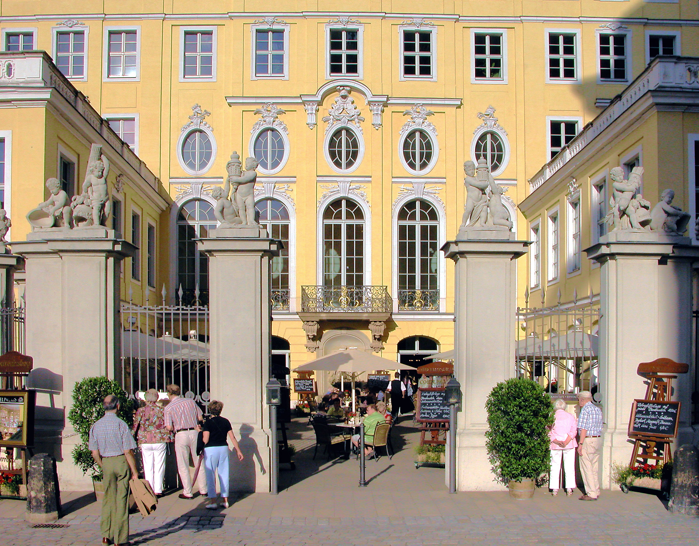 15.07.2006 01067 Dresden-Altstadt, Neumarktgebiet: Coselpalais (Mitte 18. Jh.; Wiederaufbau 1998-2000) An der Frauenkirche. Der Ehrenhof wird gastronomisch genutzt. Darüber liegt über zwei Fensterhöhen der Festsaal. [DSCN10720.TIF]20060715065DR.JPG(c)Blobelt